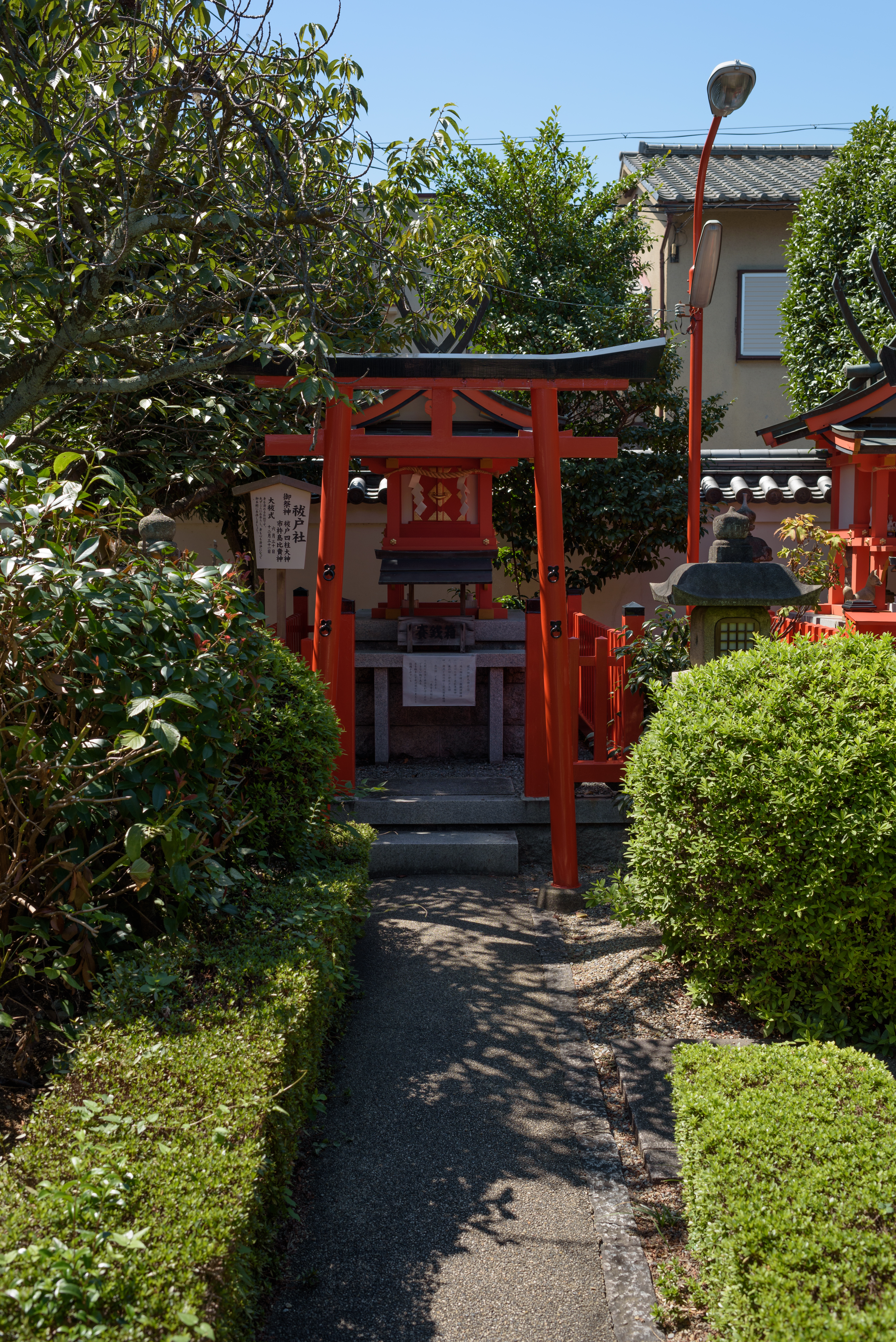 御霊神社祓戸社